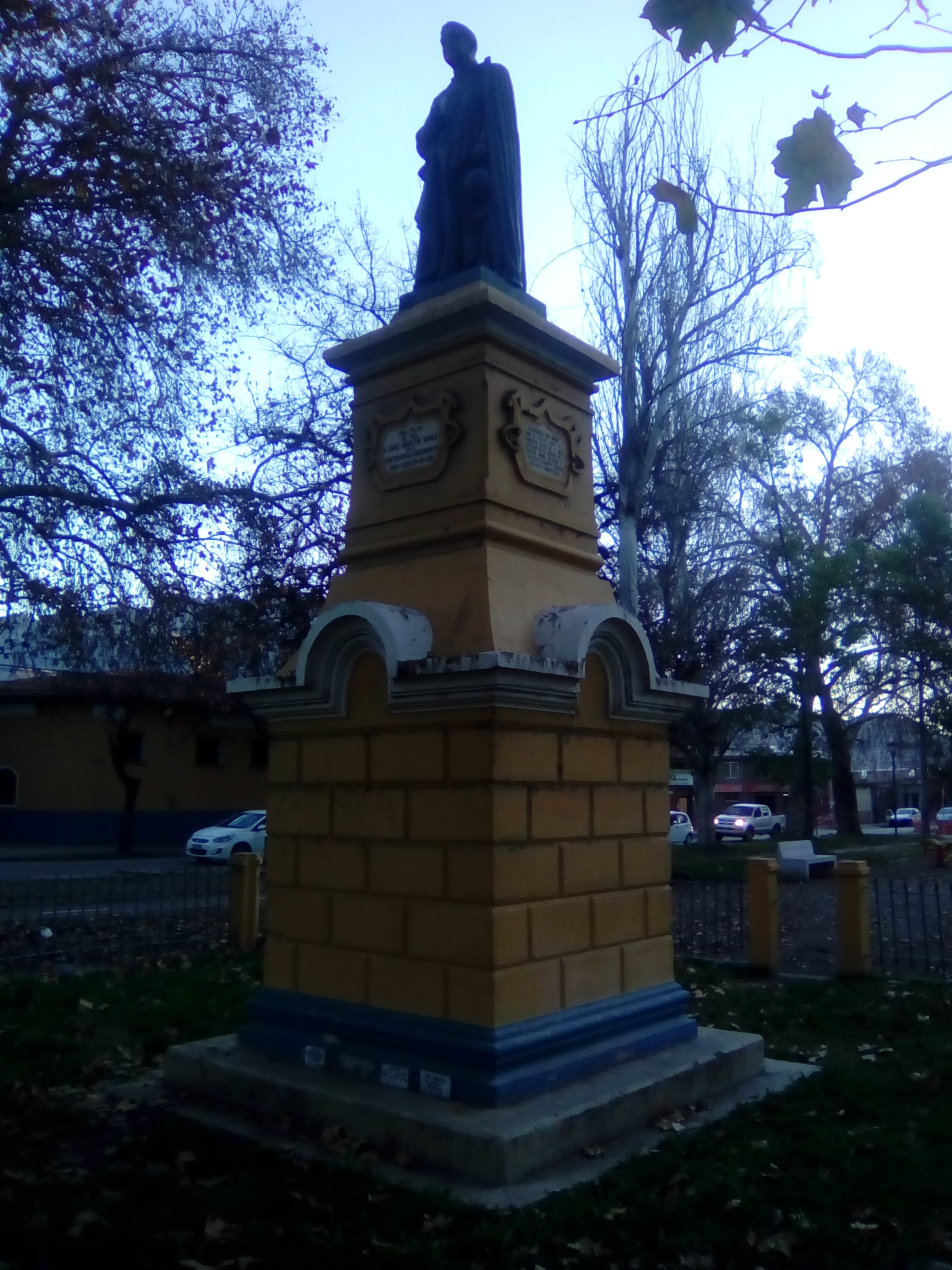 Monumento